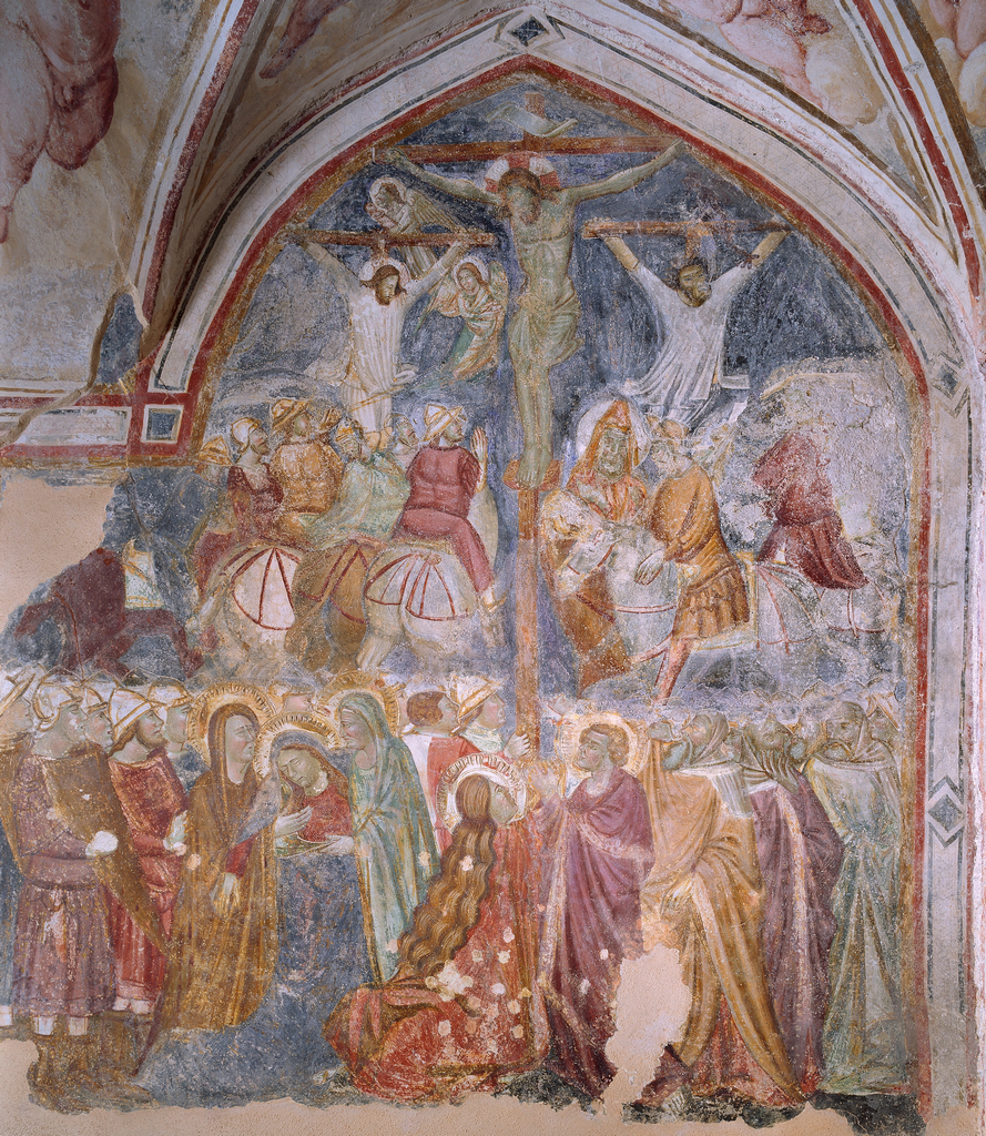 Roberto Oderisi - Crocifissione - c. 1340 Materiali: affresco Collocazione: Chiostro Paradiso, Amalfi